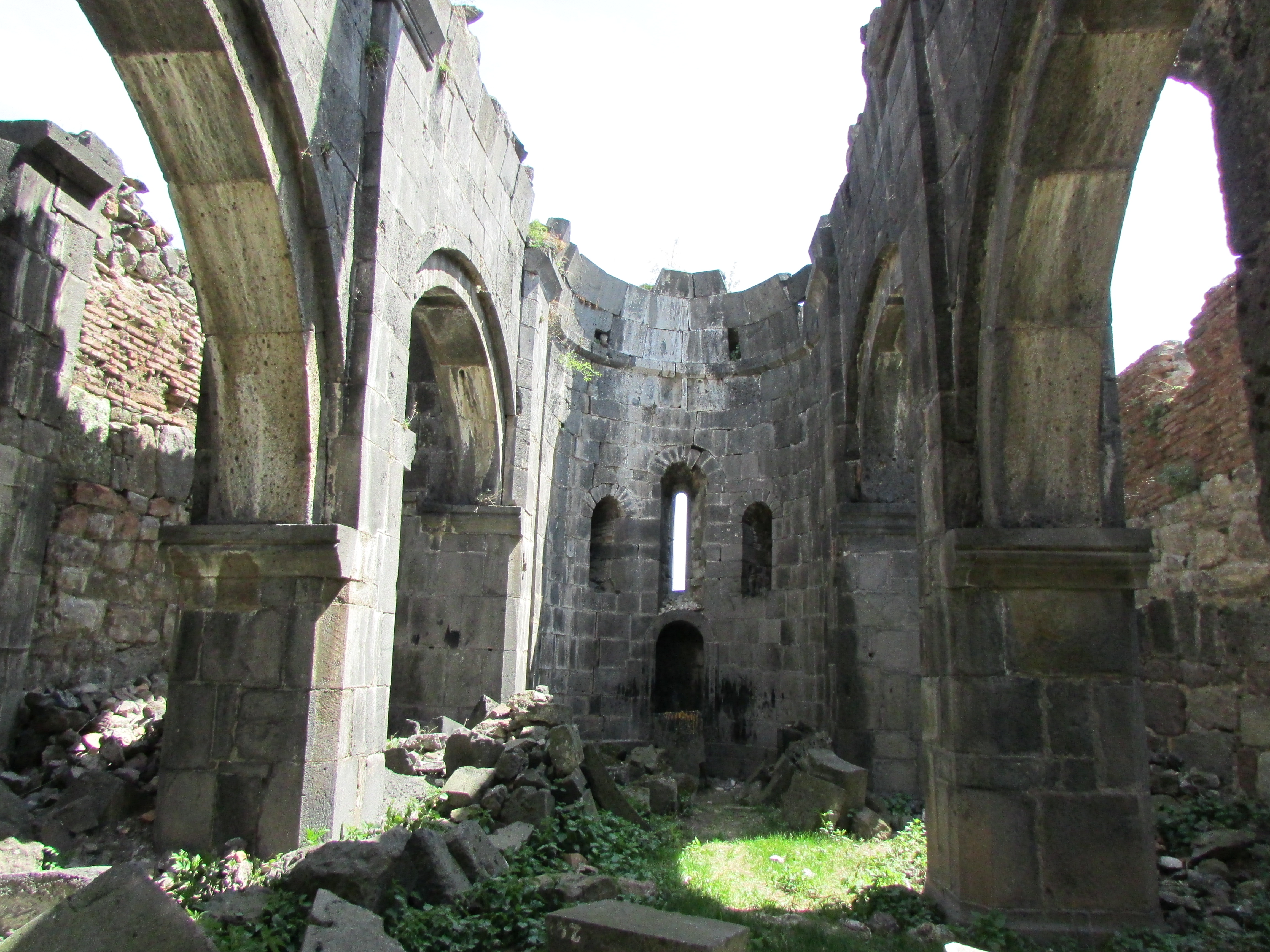 Եկեղեցի «Բգավոր» 22/4.3